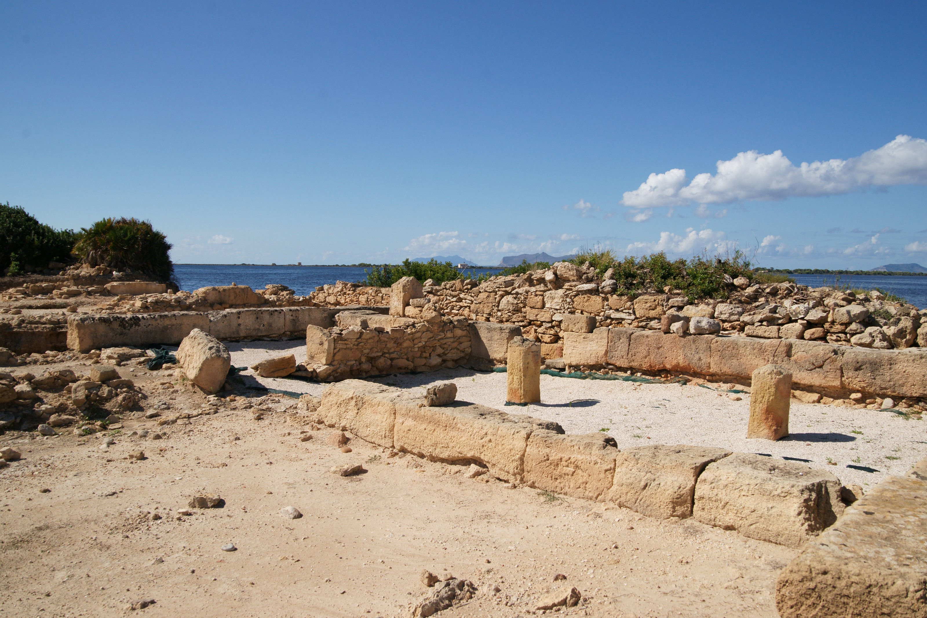 Mozia: Nordwesttor, Heiligtum